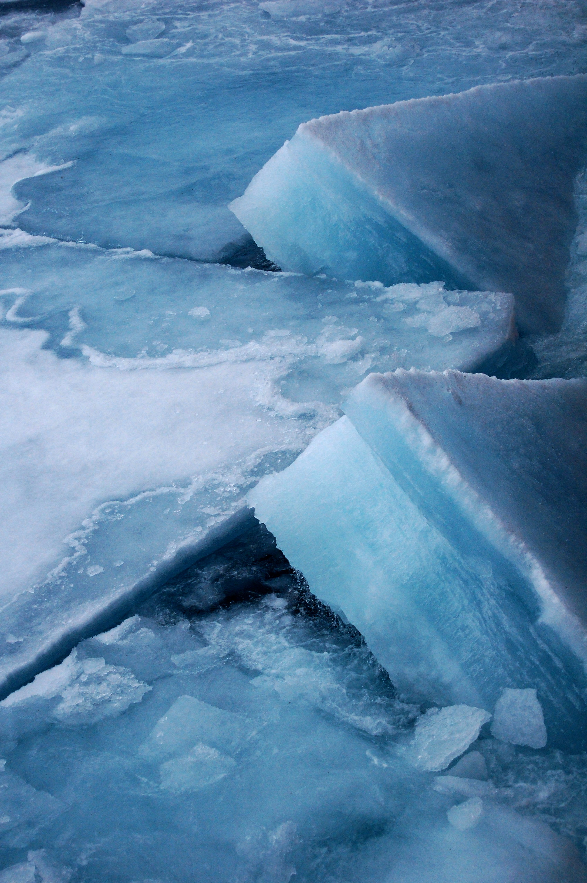 Ломающийся лёд после прохода ледокола.